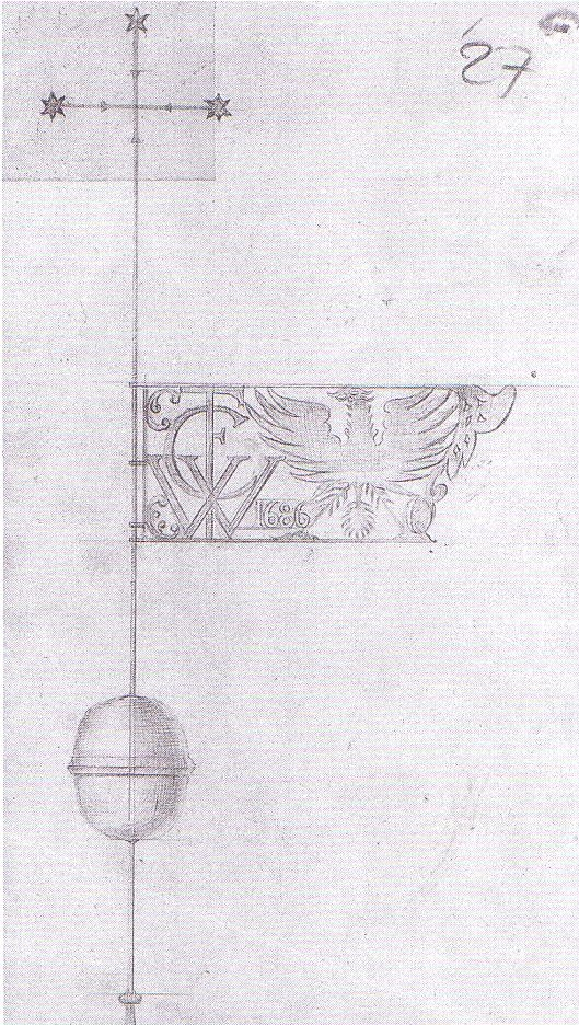 undatierte Bleistiftzeichnung der Wetterfahne auf dem Königsberger Schlossturm mit der Jahreszahl 1686 und den Initialen des Großen Kurfürsten CFW